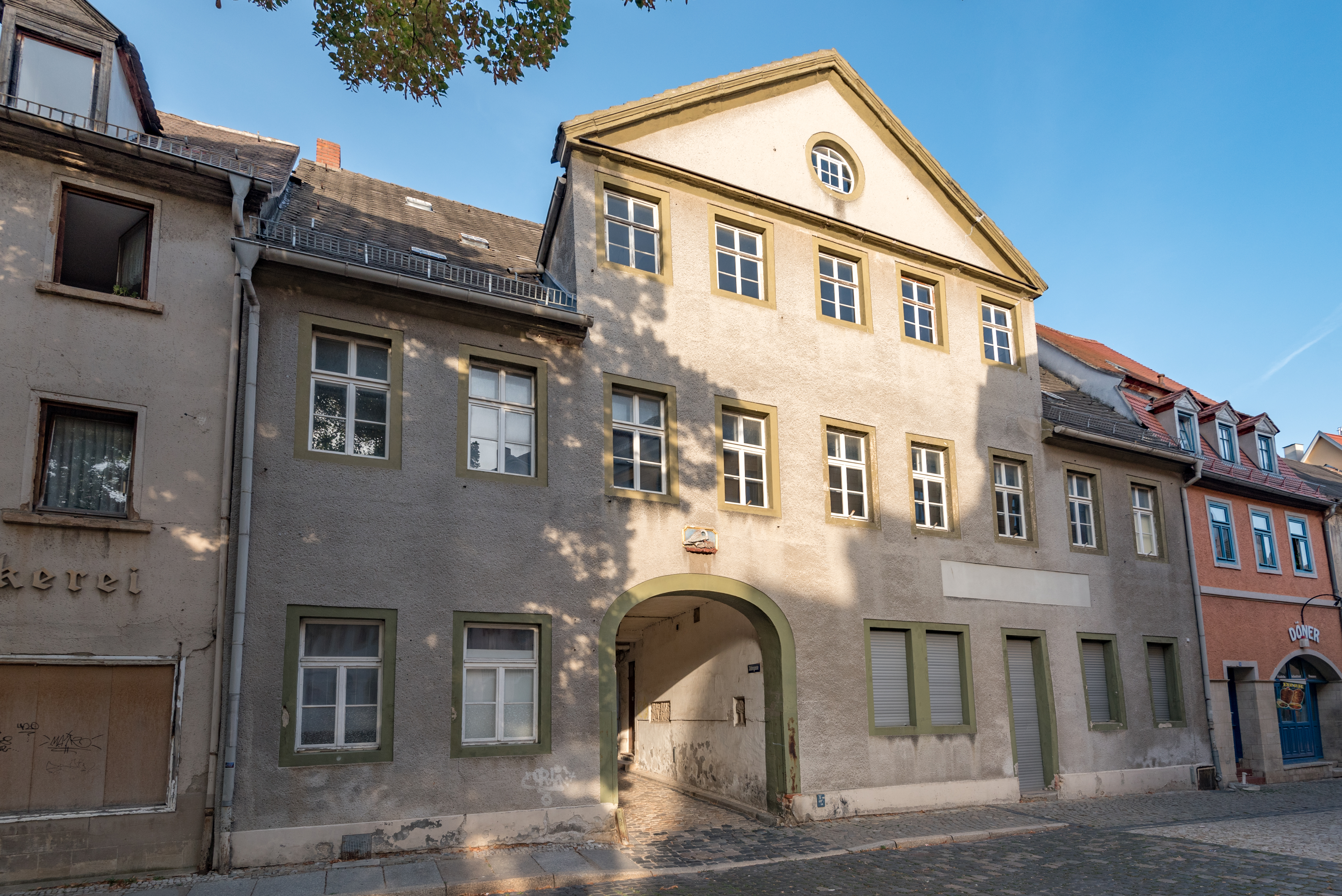 Naumburg (Saale), Topfmarkt 14